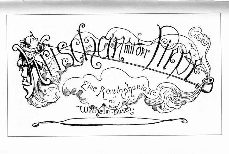 Scan ut dat Book Krischan mit der Piepe vun Wilhelm Busch.